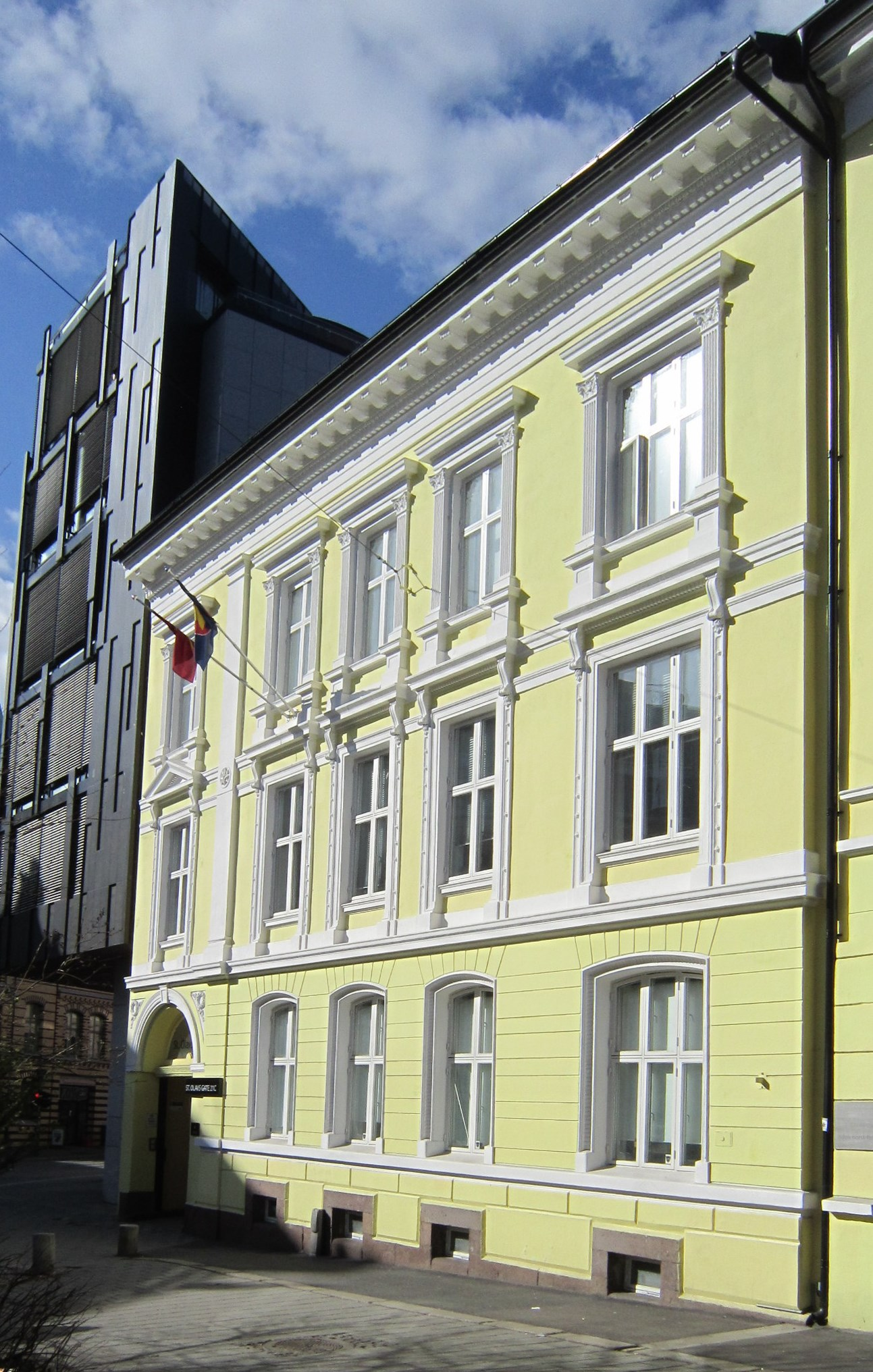 St. Olavs gate 21C i Oslo. Her holder Vietnams ambassade til.